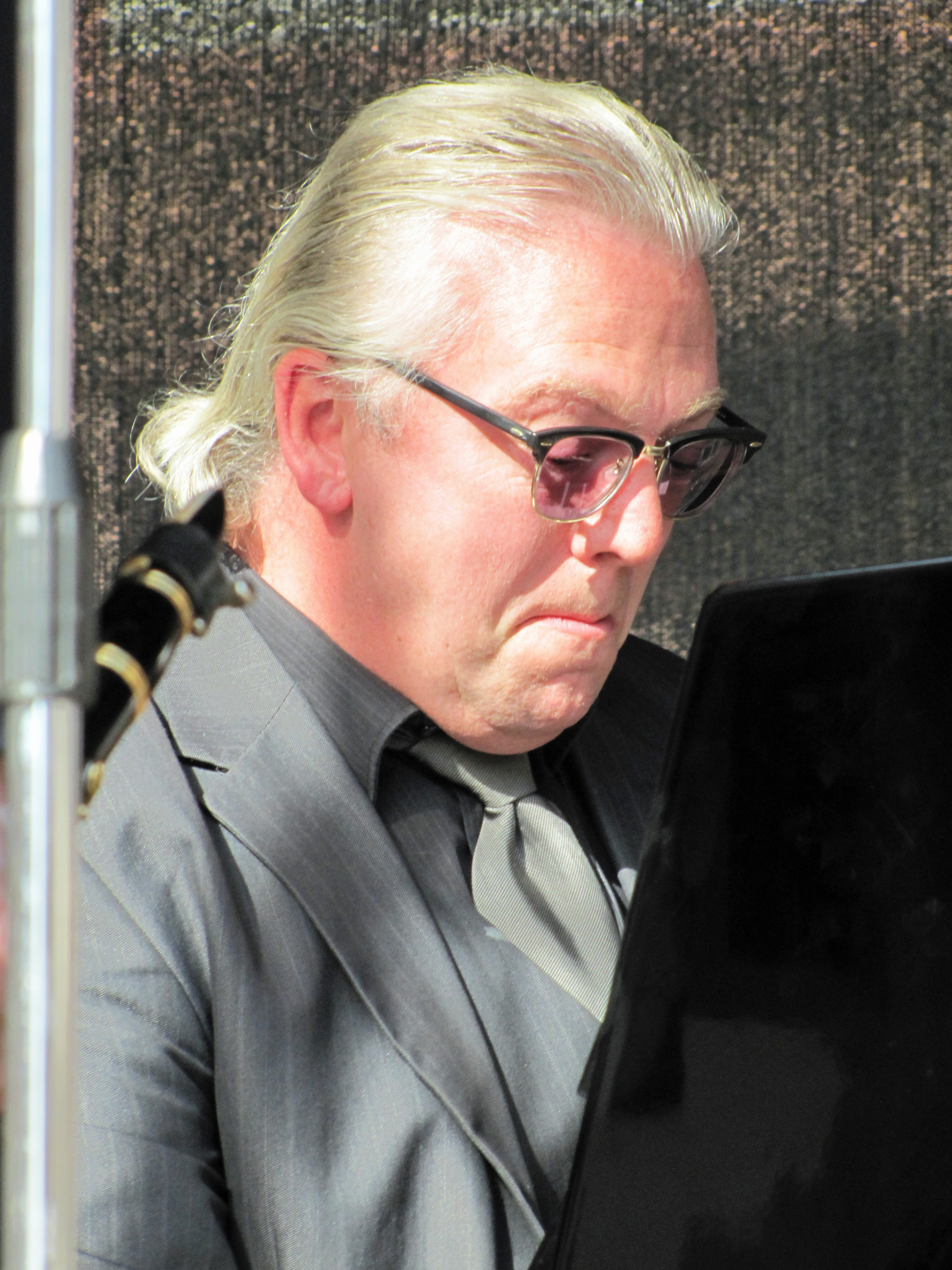 Thilo Wagner mit den "Red Hot Hottentots", bei "Jazz zum Dritten" 2013, auf dem Römerberg in Frankfurt am Main.